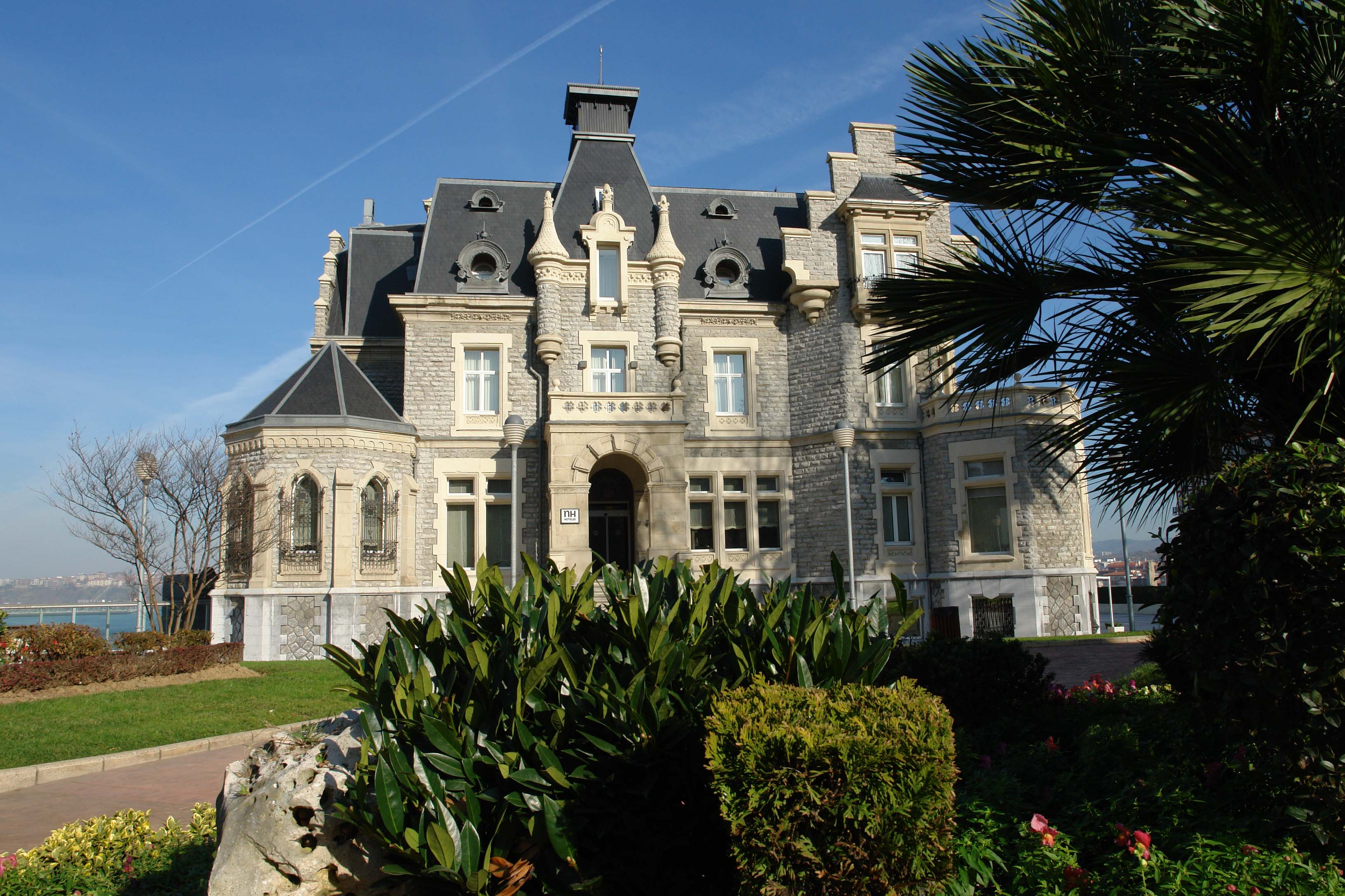 Antiguo Palacio de Oriol, actual Hotel NH Palacio Oriol